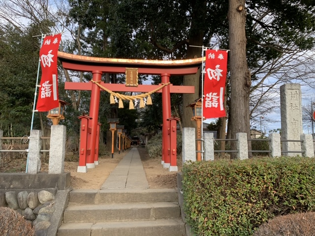 埼玉県鶴ヶ島市脚折町に鎮座する白鬚神社の鳥居